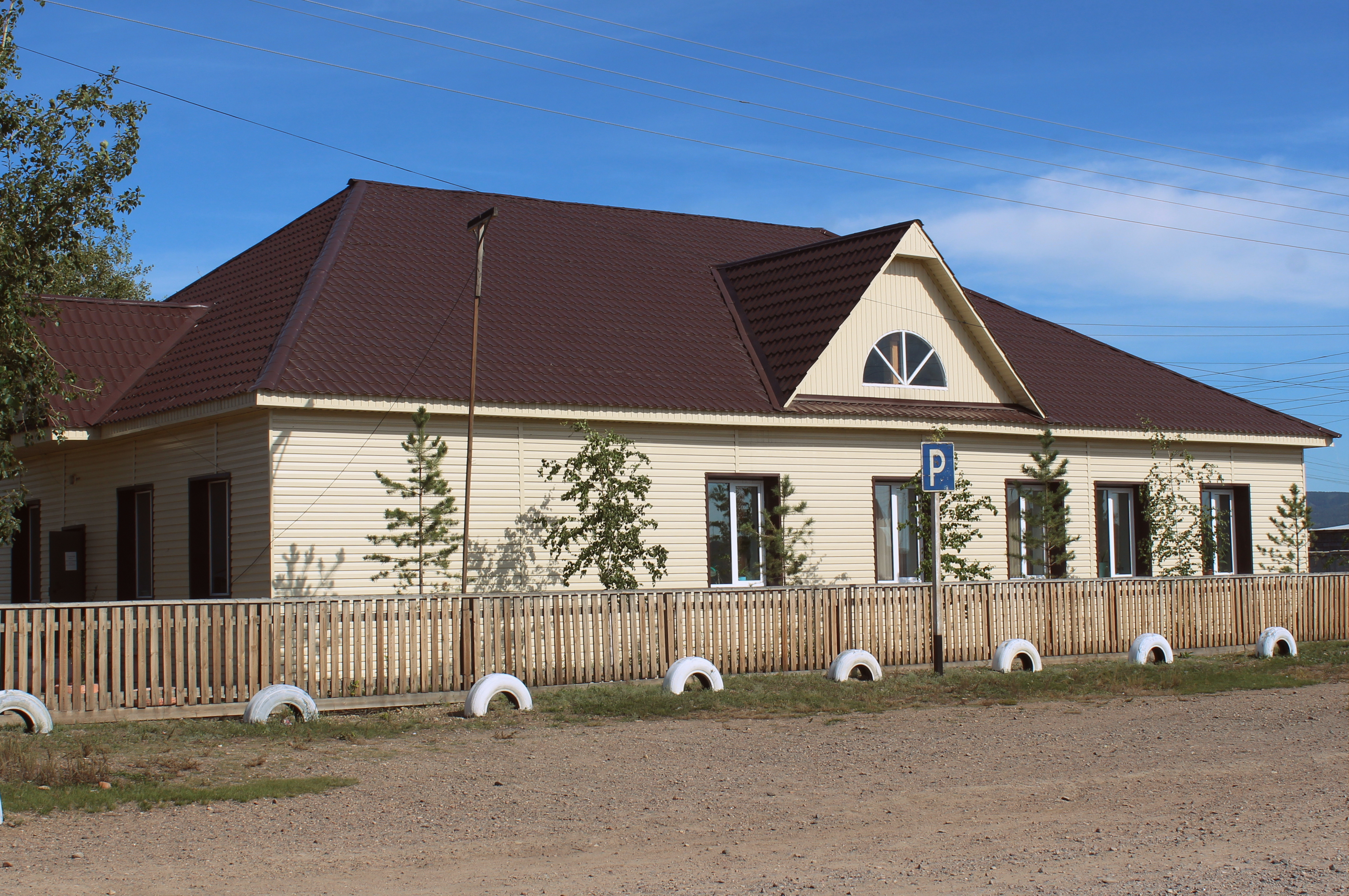 Амбулатория в поселке Джида. Бурятия, Джидинский район